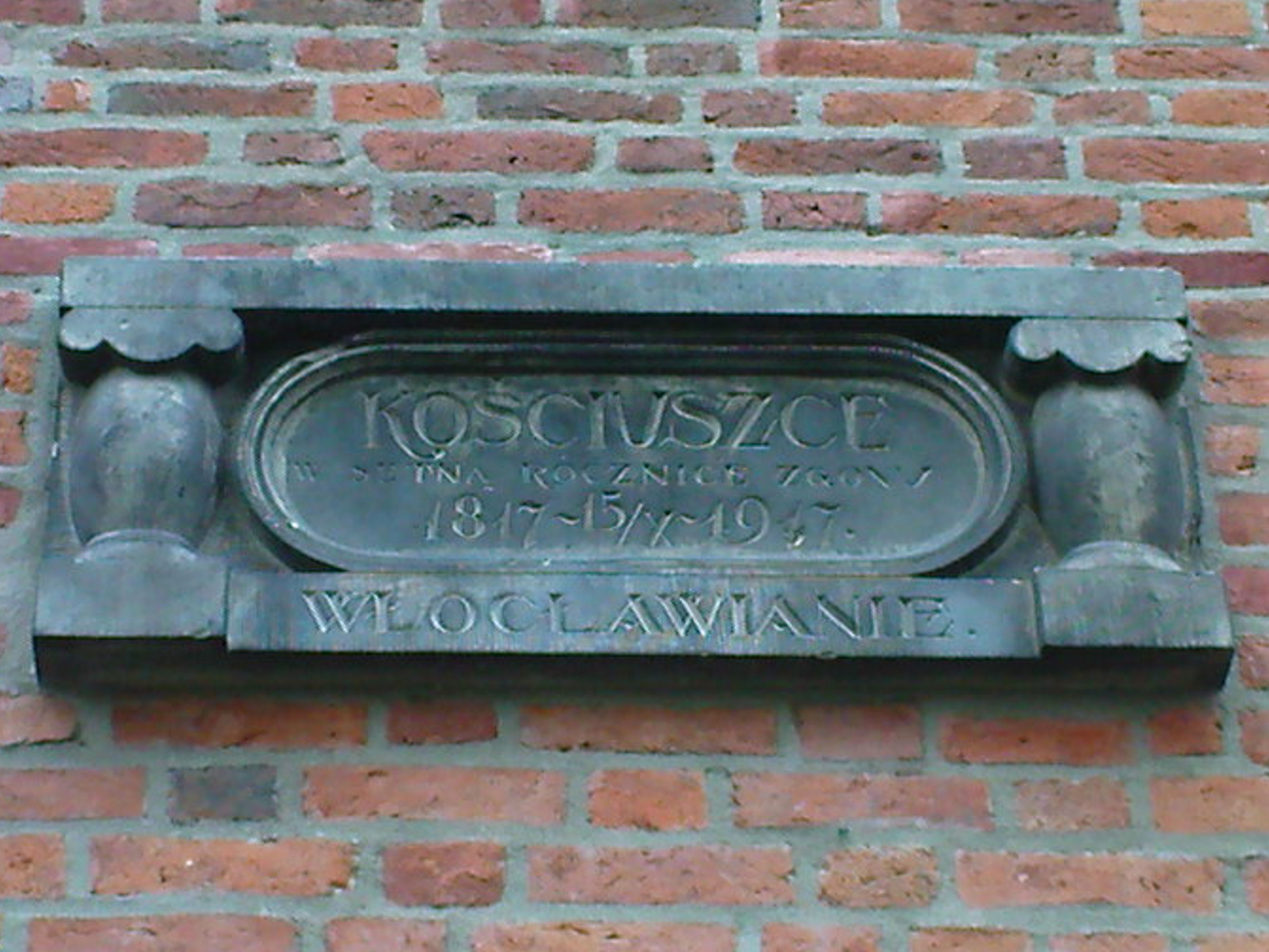 Fara św Jana Baptysty we Włocławku - tablica wmurowana w ścianę kościoła od strony Wisły w setną rocznicę zgonu Tadeusza Kościuszki